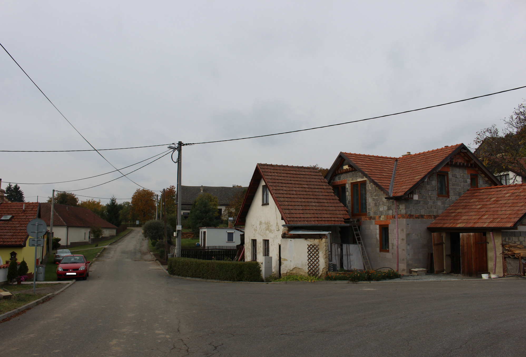 Babolky, část města Letovice v okrese Blansko, Jihomoravský kraj